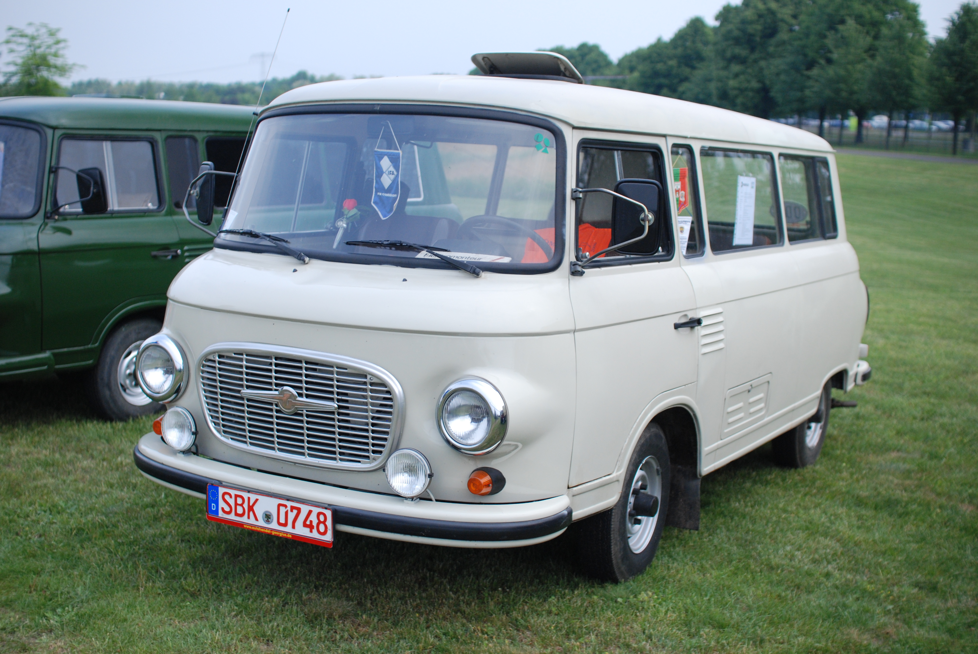 1. Magdeburger Oldtimertag am 21.05.2011 im Elbauenpark Magdeburg